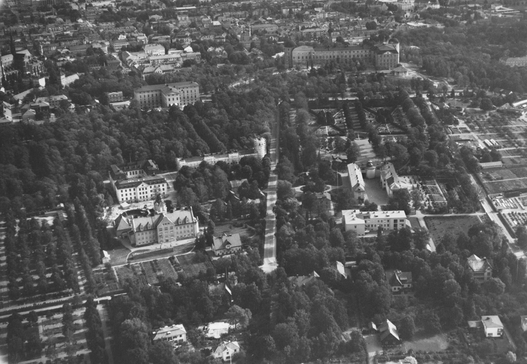 photos, uppsala, sweden